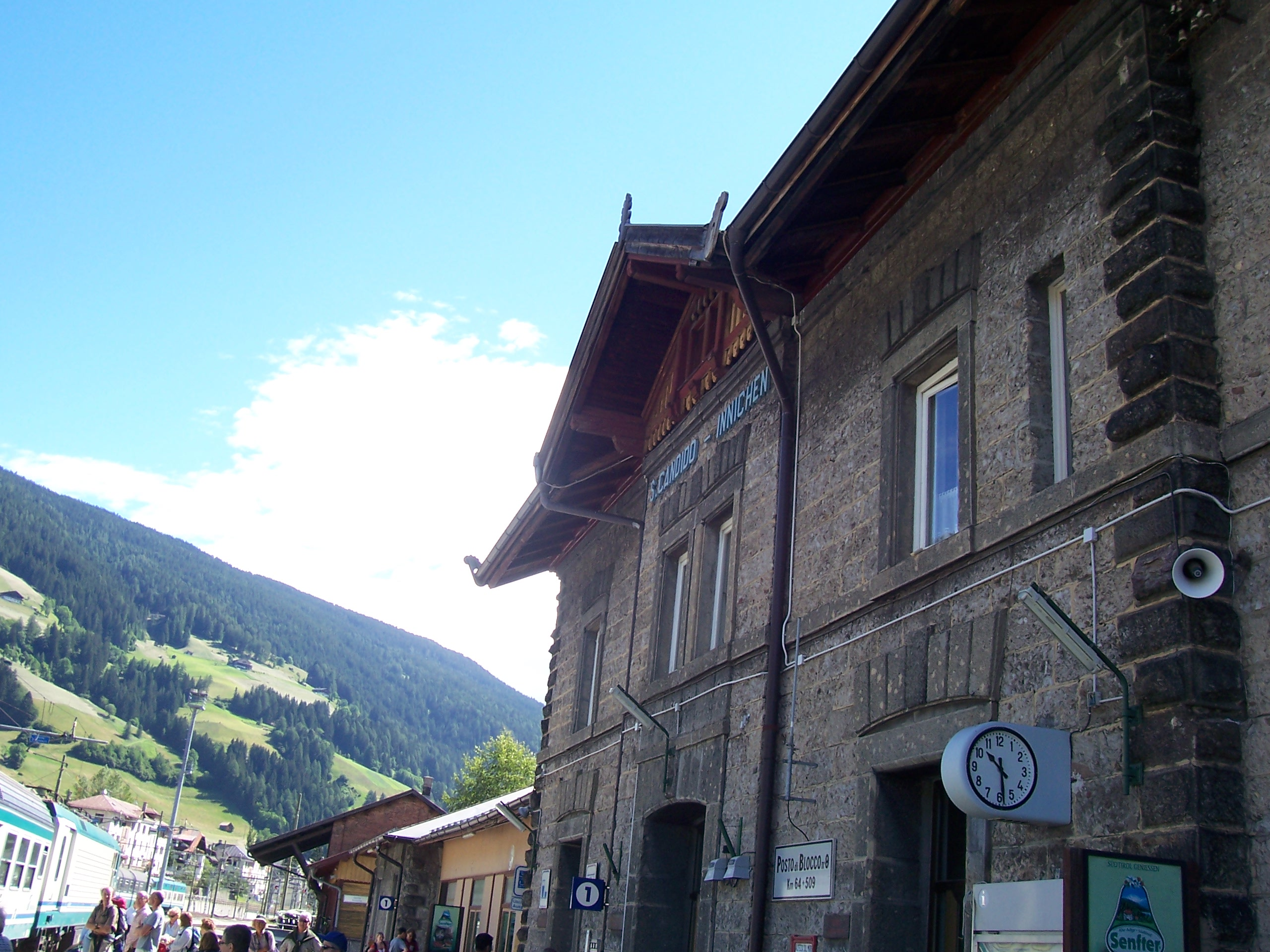 Stazione di San Candido (Bolzano) - Bahnhof Innichen (Bozen) - San candido/Innichen train station (Bolzano/Bozen)